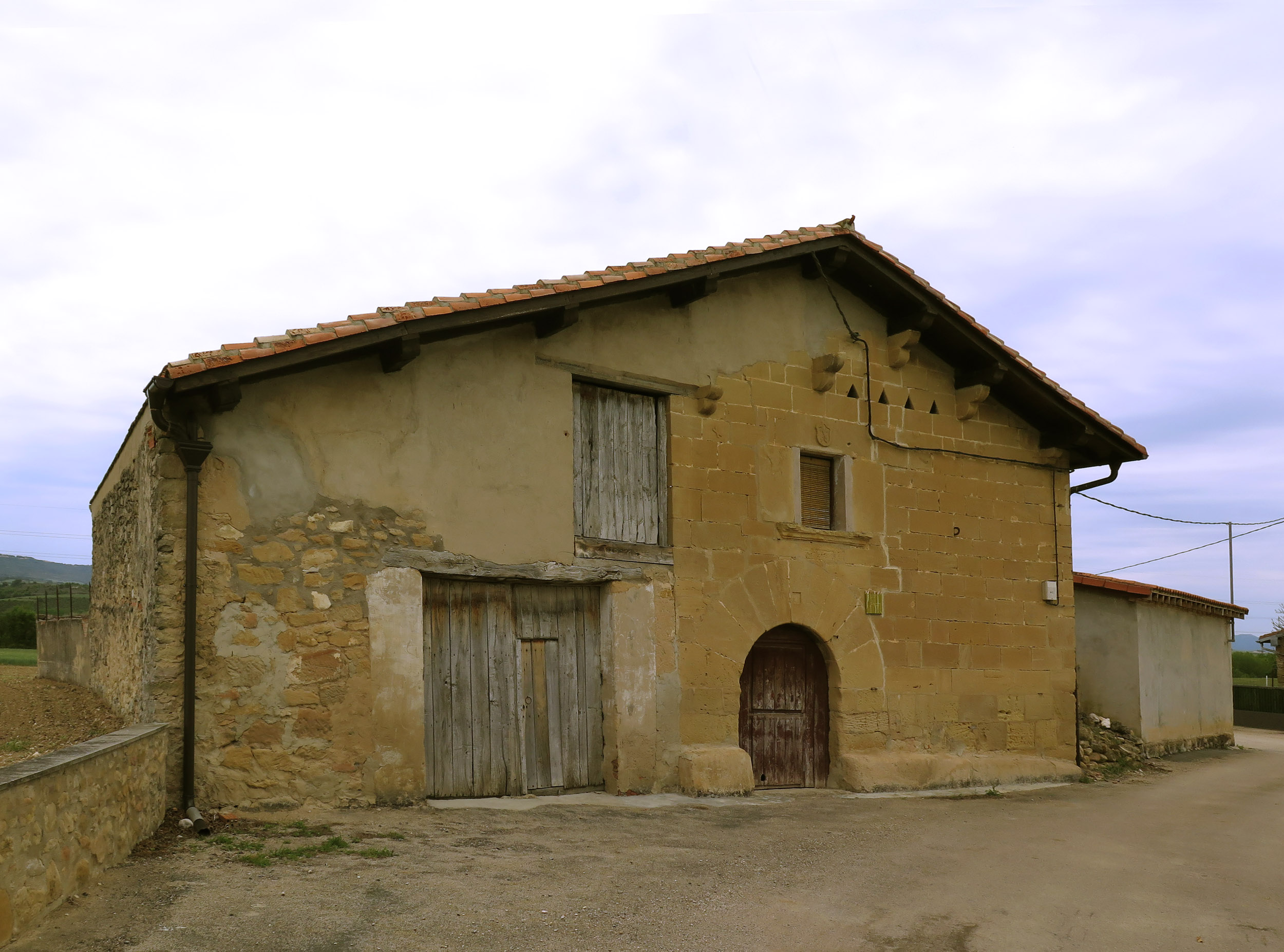 Caserón/Caserío de la localidad de Montañana (Miranda de Ebro), provincia de Burgos (España)